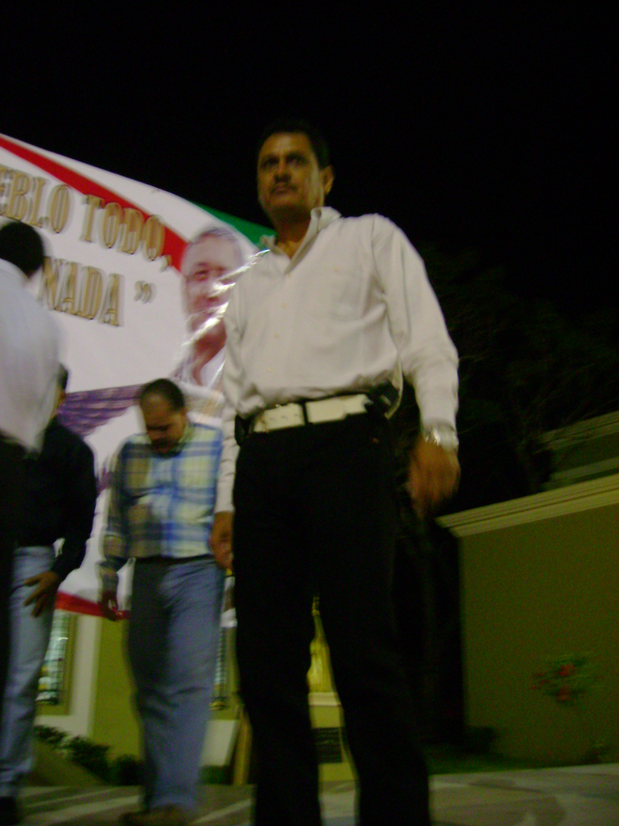 Reené Díaz Mendoza durante la visita de Andres Manuel Lopez Obrador a Colima